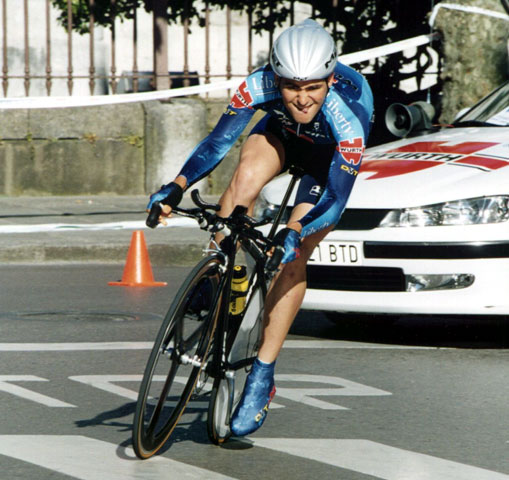 Afbeelding van Eladio Sanchez Prado.